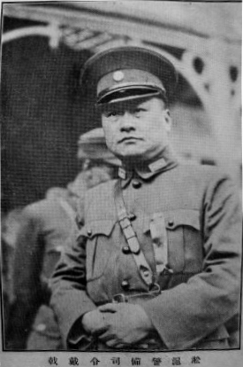 戴戟